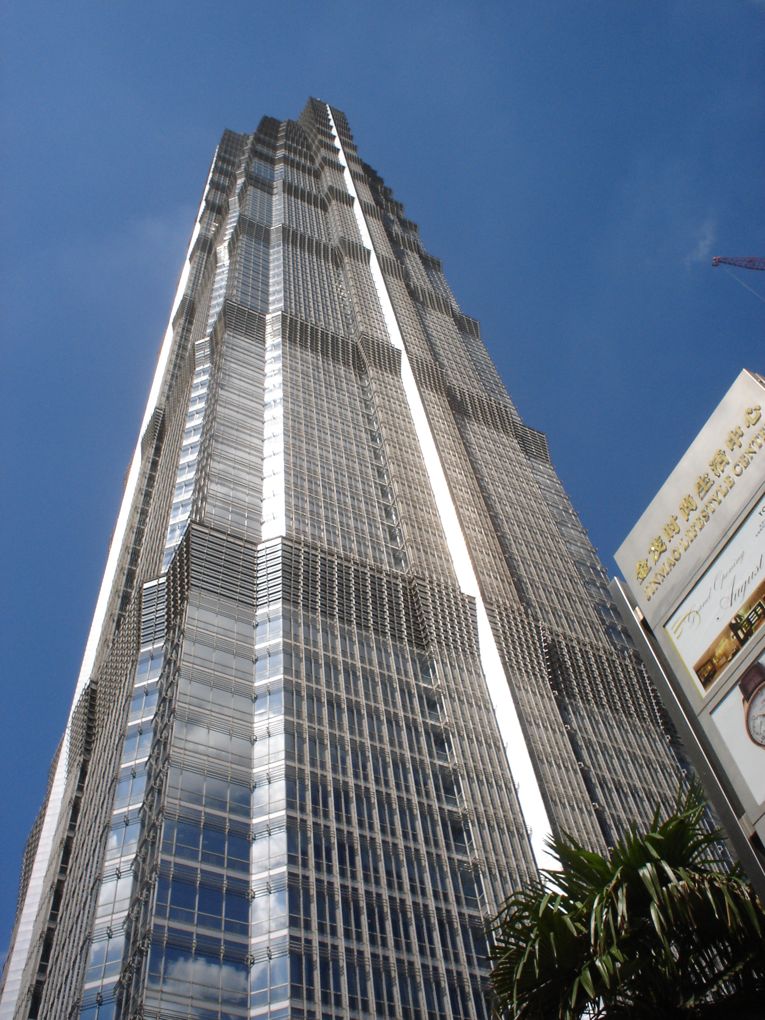 Jin Mao Tower, Shanghai